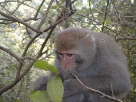 Macaque de Formose, Macaca cyclopis se nourrissant dans son environnement naturel. Photographie de Minna J. Hsu avec son aimable autorisation.